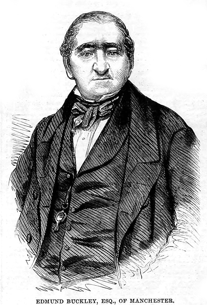 Sir Edmund Buckley (1780-1867)